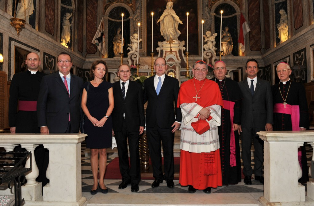 Domini Duka na návšteve v Monaku, Jeho Jasnosť Princ Albert II. Monacký (vľavo)